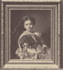 Etude d'enfant